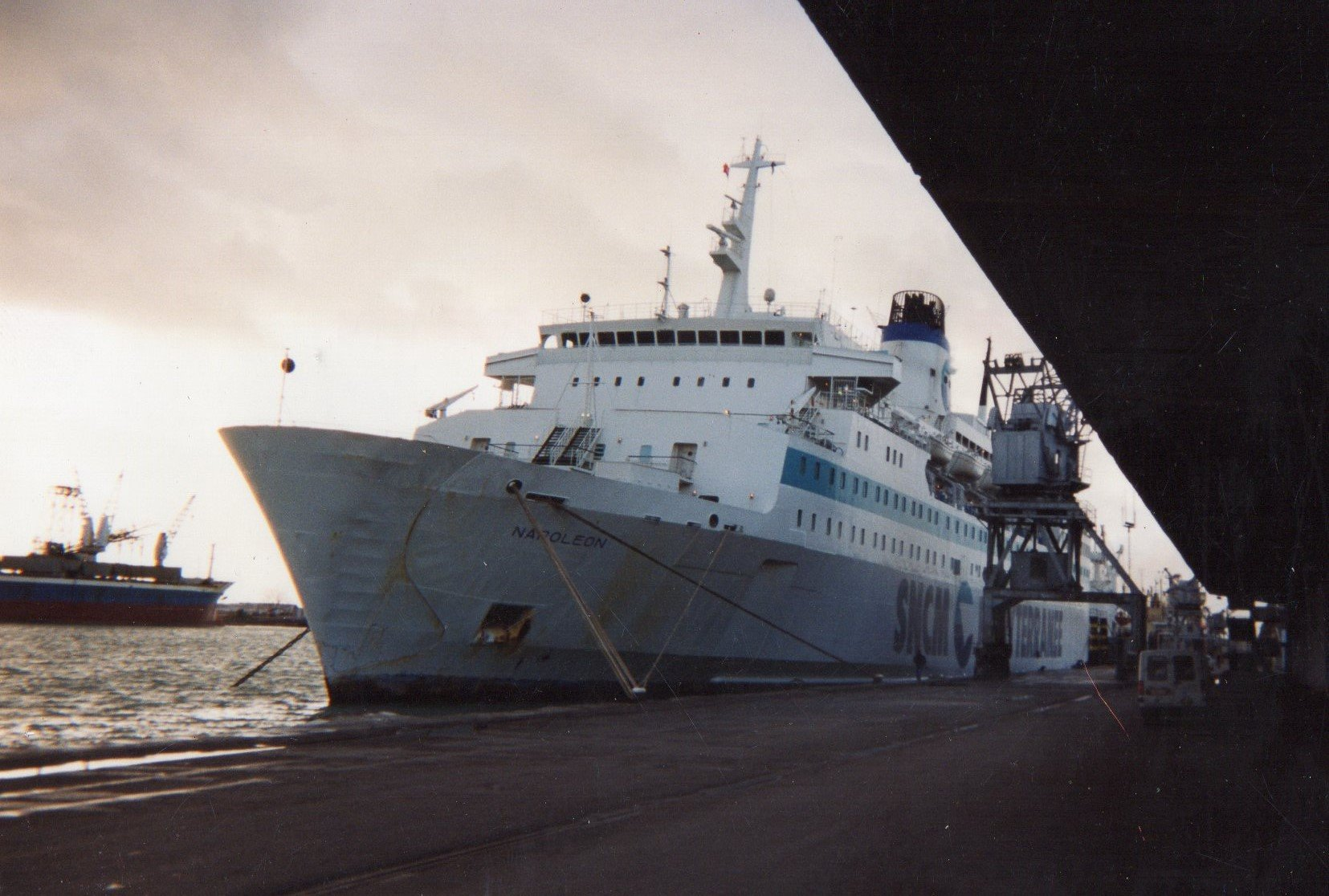 Le Napoléon de la SNCM à Tunis.